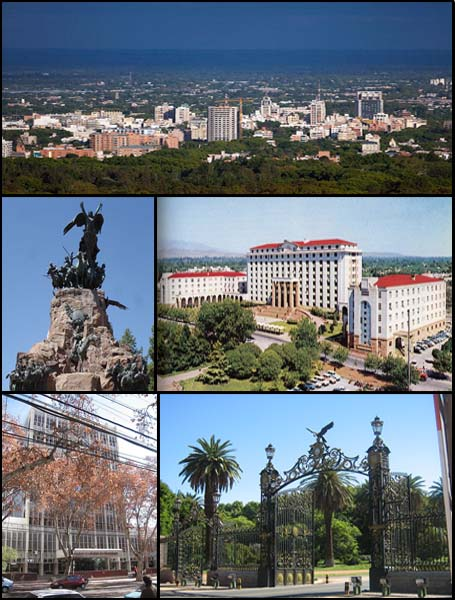 Foto principal de : Ciudad de Mendoza